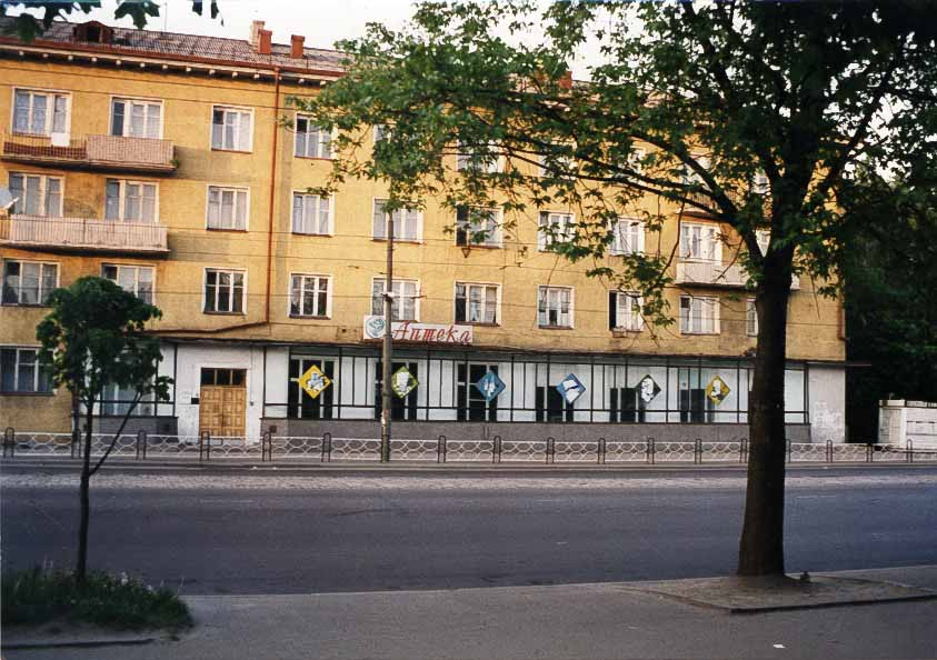 An dieser Stelle soll sich nach einer Zeugenaussage das Bernsteinzimmer befunden haben.